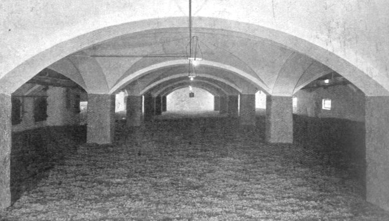 Malteri (Mashing), Frydenlund bryggeri, ca.1890. From "Norge i det nittende aarhundrede" 1900. Scanned by User:Friman july 2006.